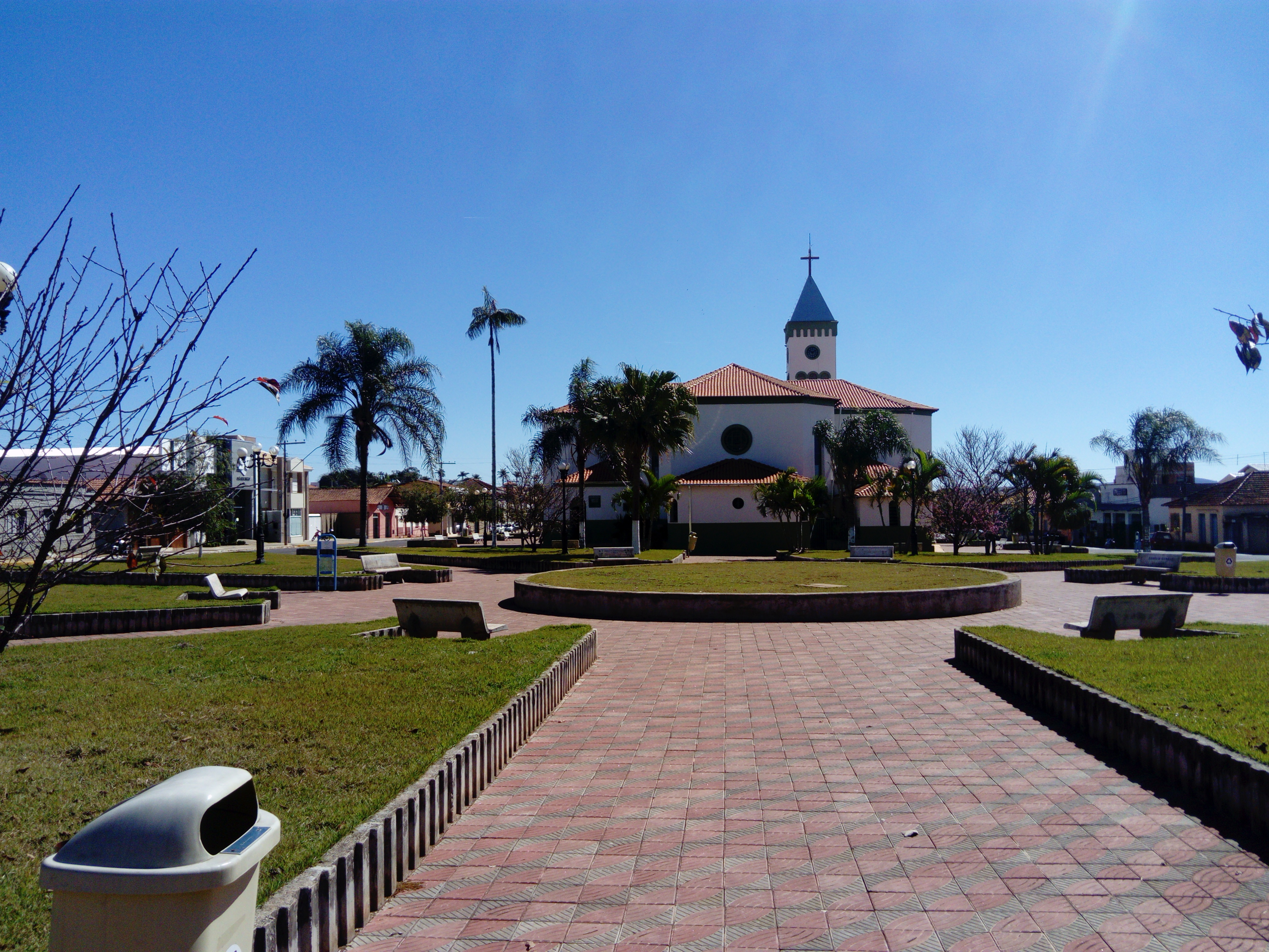 Praça Central de Divisa Nova.